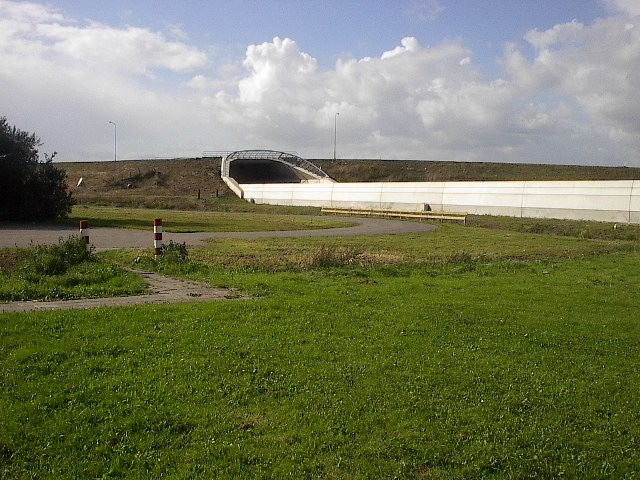 Betuweroute naast een tankstation aan de A15